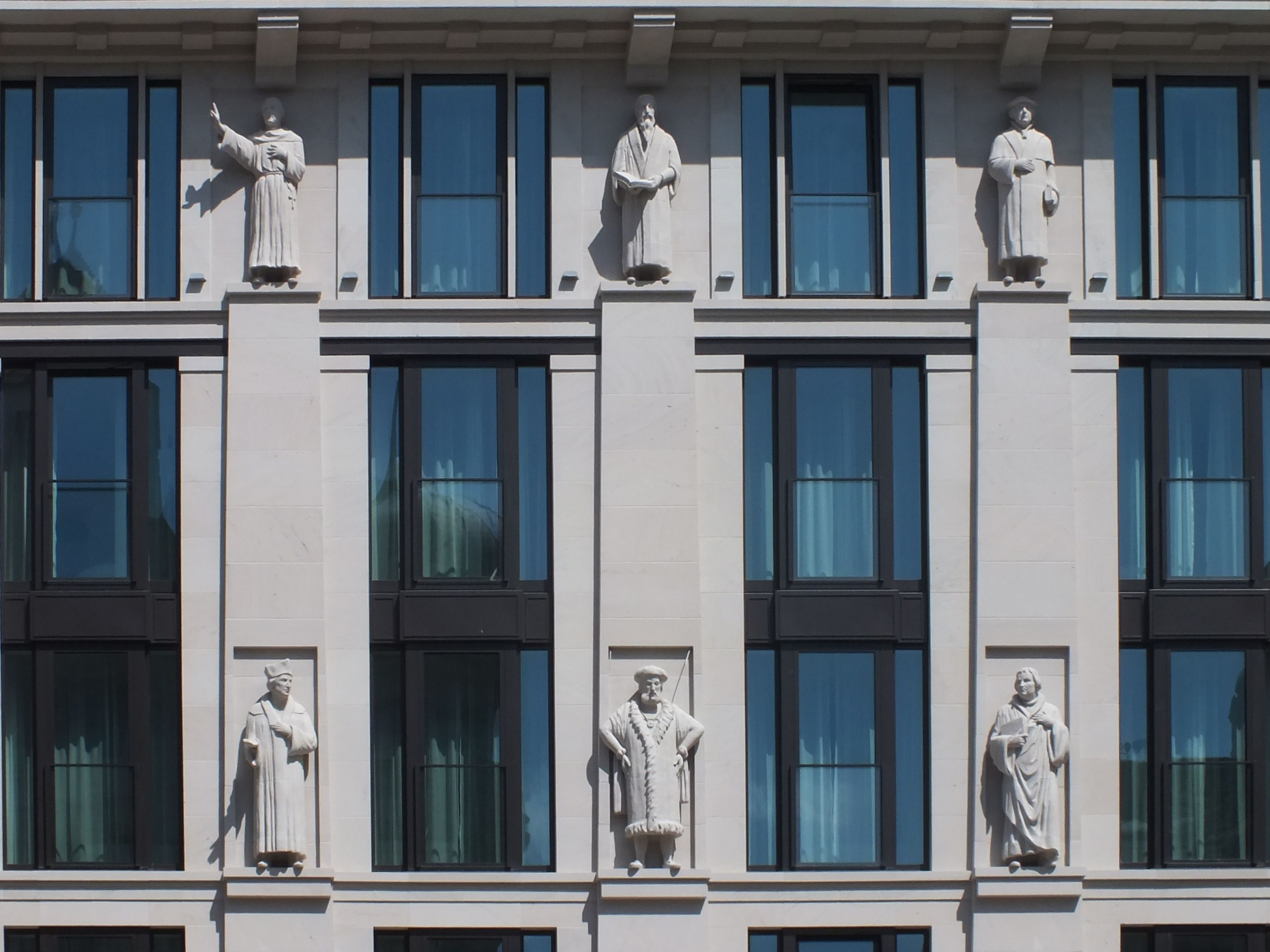 Statuen am Haus Burgplatz-Passage in Leipzig mit Bezug zur Leipziger Disputation 1519